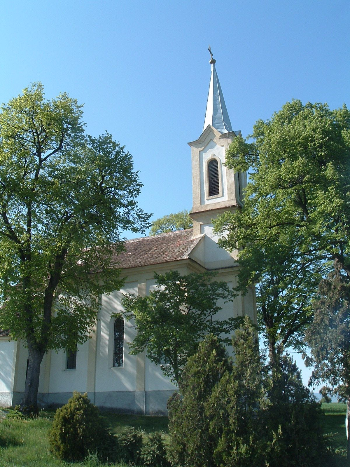 Kisnarda Church, Narda, Hungary. Fájdalmas Szűzanya római katolikus templom